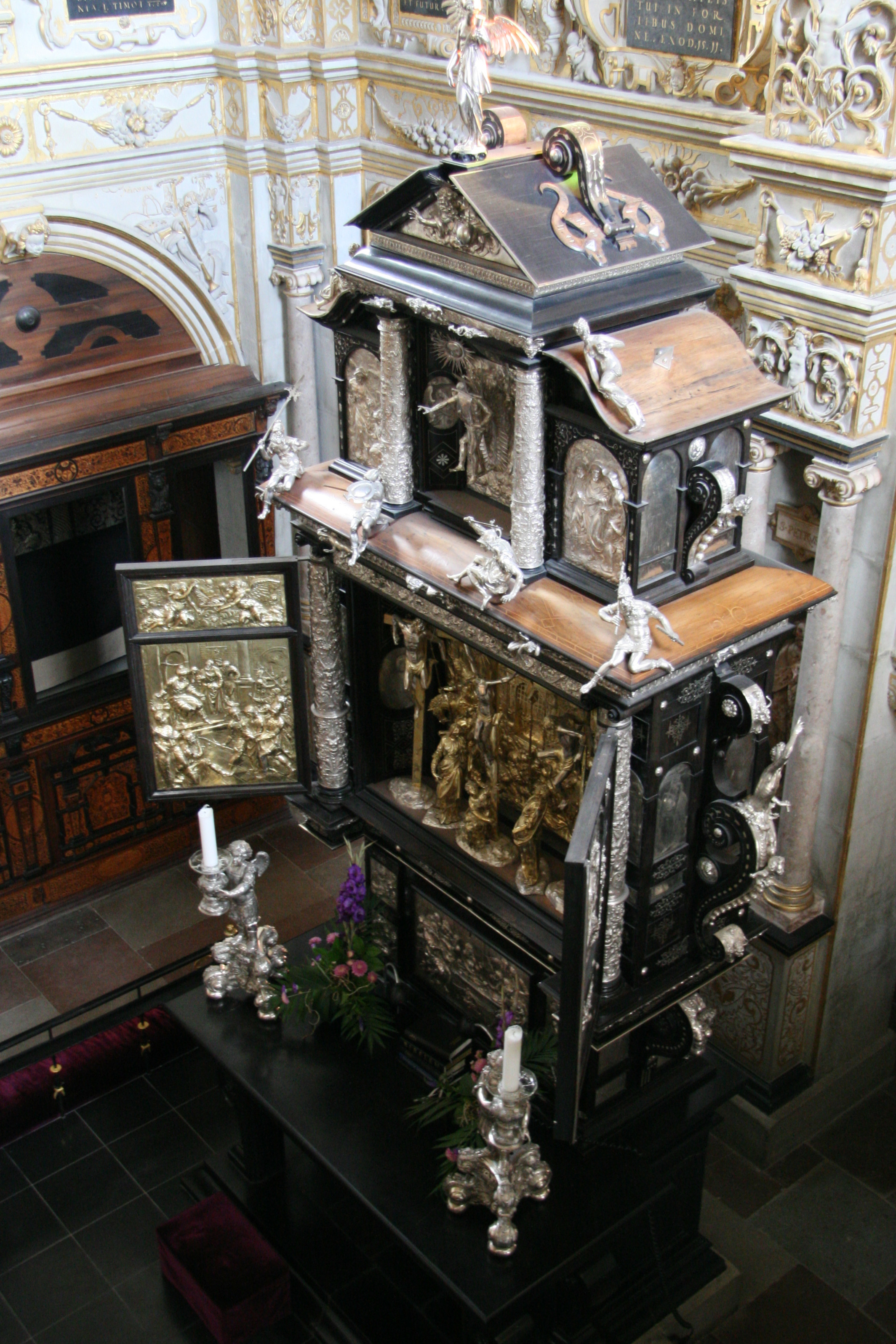 Frederiksborg Slotkirke, Hillerød, Denmark. Altar